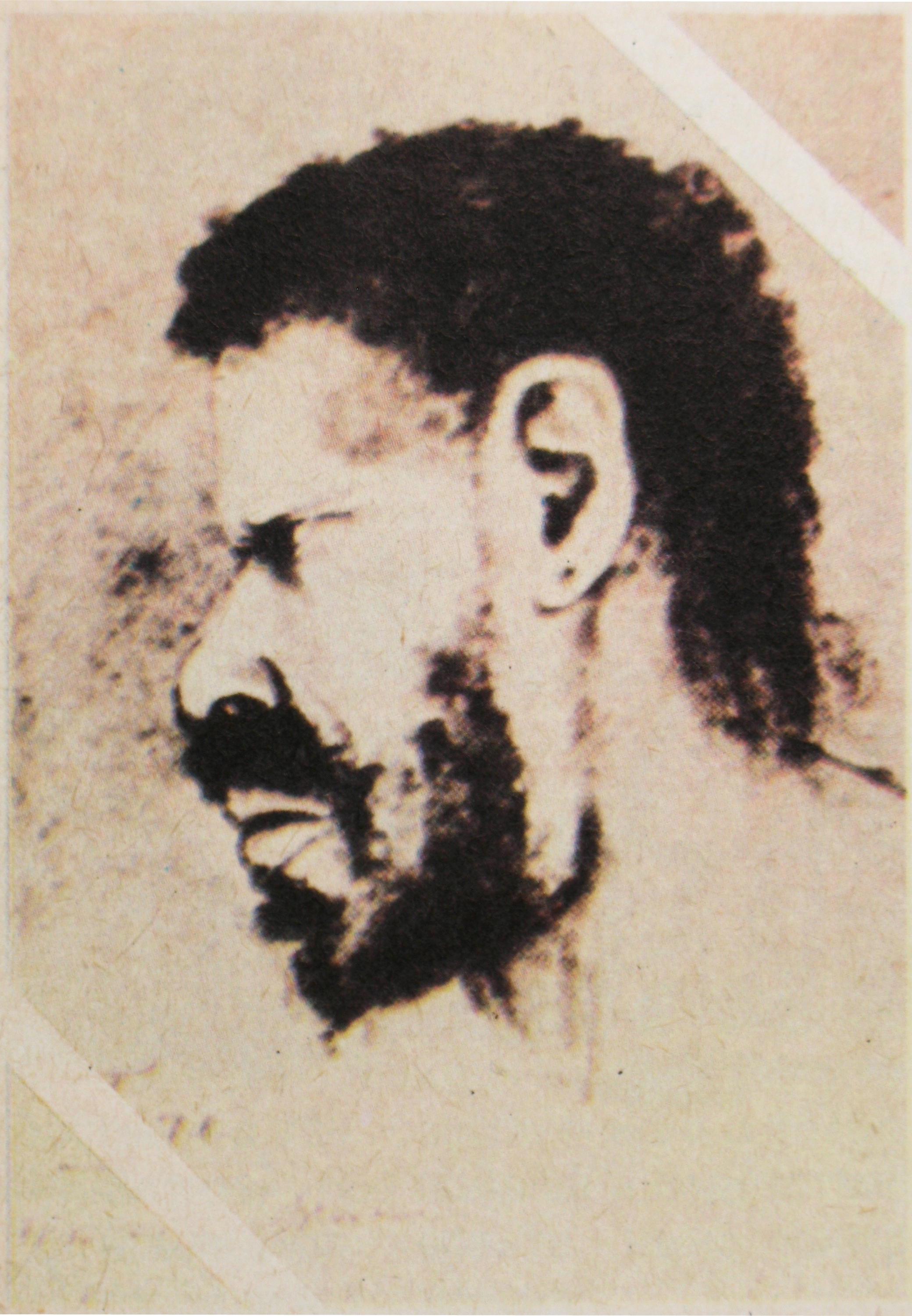 Вокруг света. 1886. Папуас. Рисунок Миклухо-Маклая. Рисунок 1871, 72, 76 или 77 года. Опубликовано в "Вокруг света", 1886.